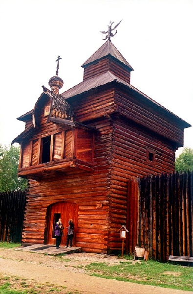 Ostrog Turm von Ilimsk (1667)im Taltzy Museum nahe Irkutsk